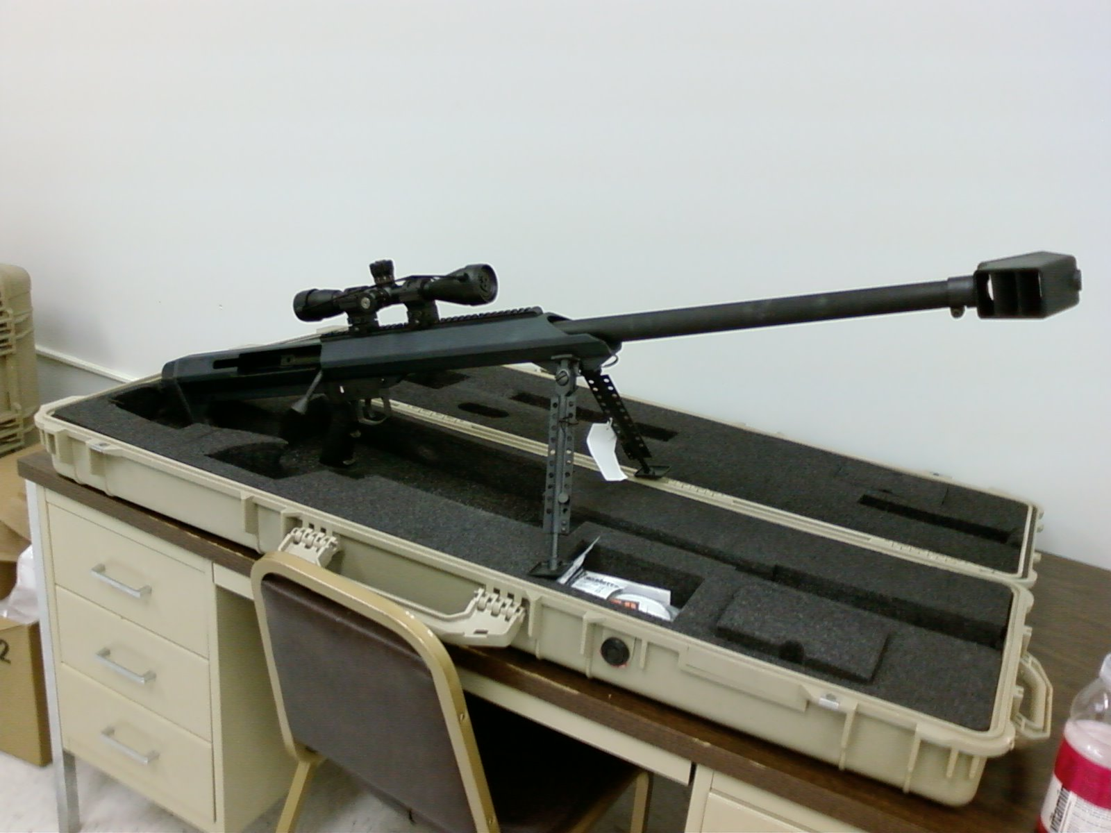 Barrett M99 Sniper rifles